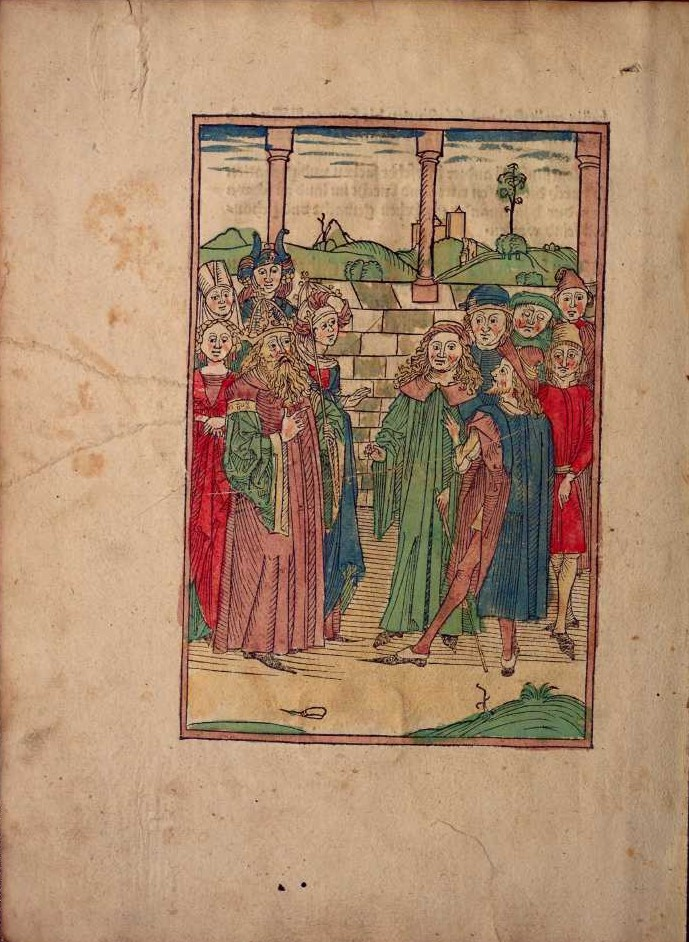 Darstellung aus Schwäbische Chronik des sogenannten Thomas Lirer in der Fassung des Ulmer Inkunabeldrucks von Konrad Dinckmut vom 12. Januar 1486. Zweiter Teil: Gmünder Kaiserchronik